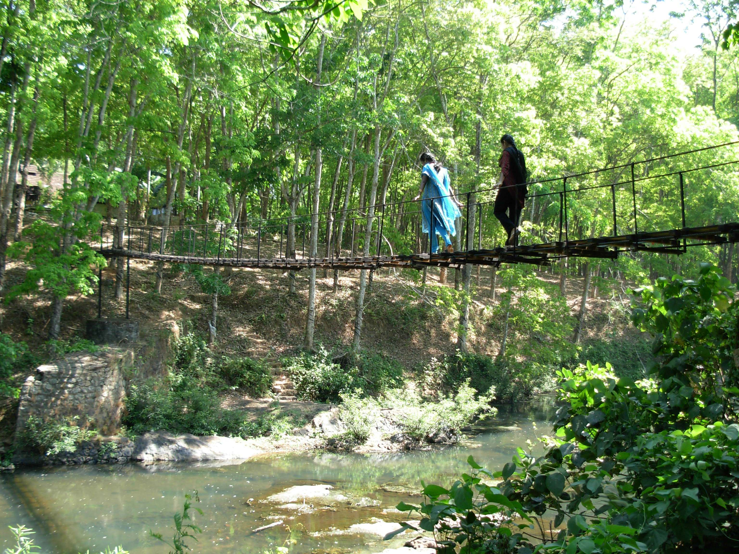 തുക്കു പാലം (കമ്പി പാലം). പുനലുരിനടുത്തുള്ള ചാലിയക്കര എ.വി.ടി റബർ തോട്ടത്തിൽ സ്തിതിചെയ്യുന്നു.